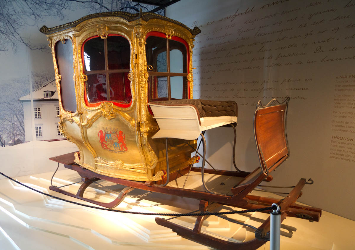 Herman Wedel-Jarlsbergs gullkaret. Fra museet ved Eidsvollsbygningen. Iflg. Eli Fure i Eidsvoll 1814, Hvordan grunnloven ble til, Dreyer forlag, består gullkareten av beskårne rokokkoornamenter, på dørene er våpenskjoldet til Wedel-Jarlsberg restaurert i 1900-talls stil og påmalt. Alt utvendig treverk er dekket av ekte bladgull. Sannsynligvis laget i Frankrike. Sledeunderstell. Wedel-Jarlsberg brukte dette kjøretøyet da han reiste til riksforsamlingen.